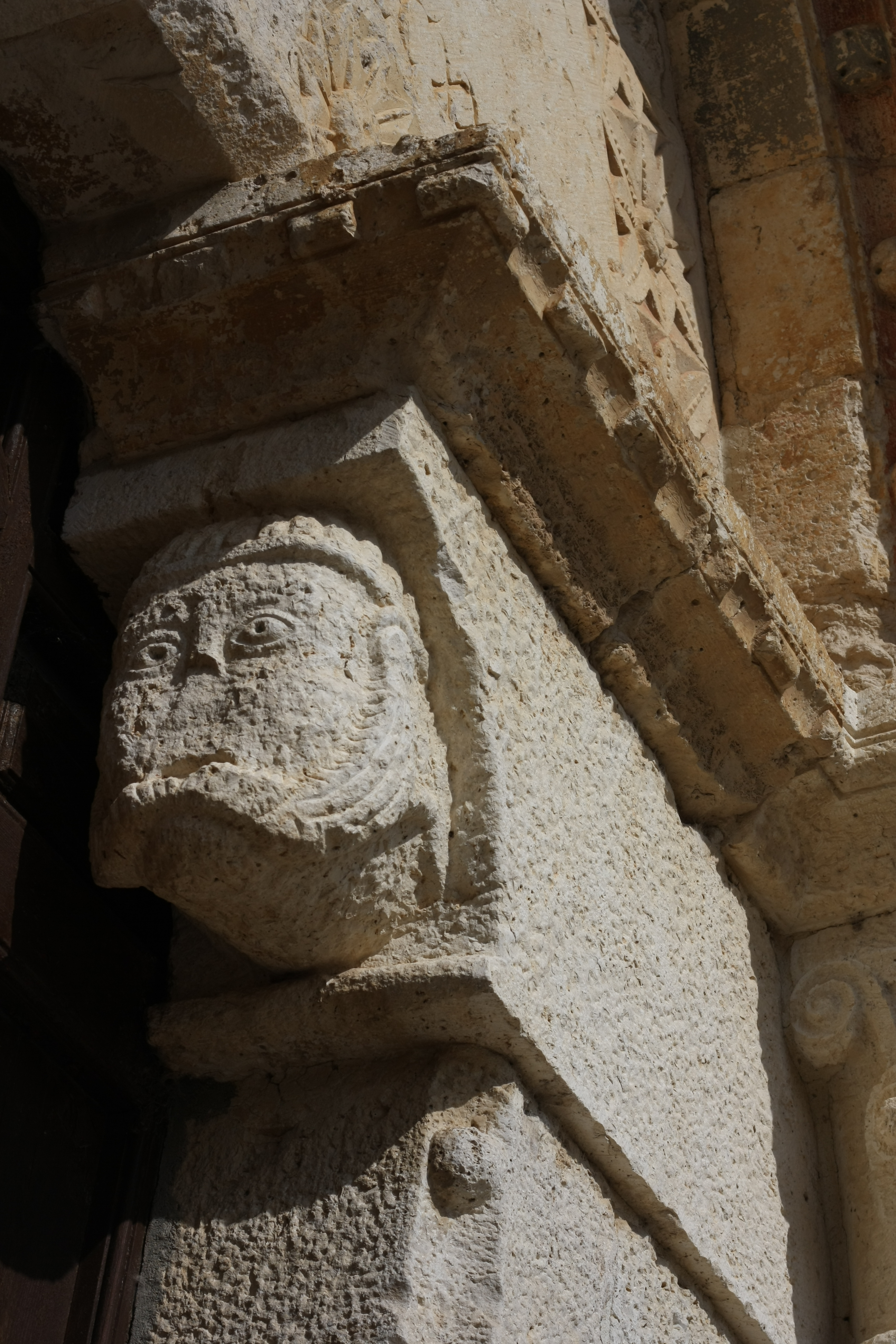 Santa María de Wamba, Portal mit Kragstein (mocheta)